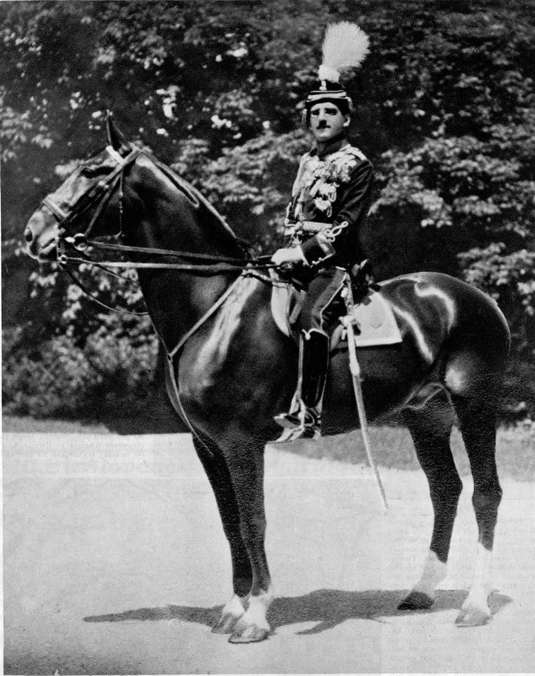 Nj. Vel. kralj Aleksander I.